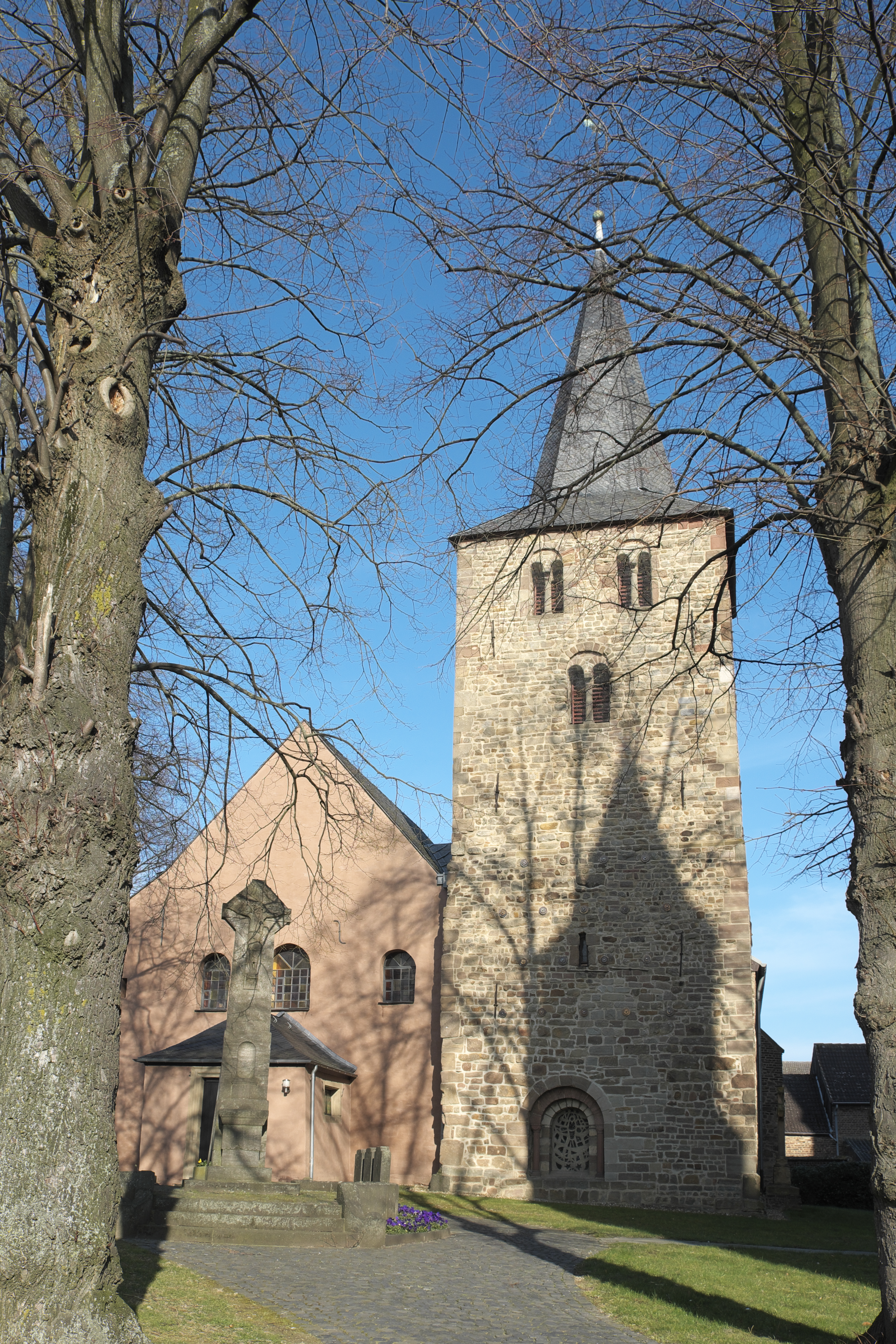 Kirche Klein St. Arnold (Arnolduskapelle) in Arnoldsweiler im Kreis Düren in Nordrhein-Westfalen (Deutschland)